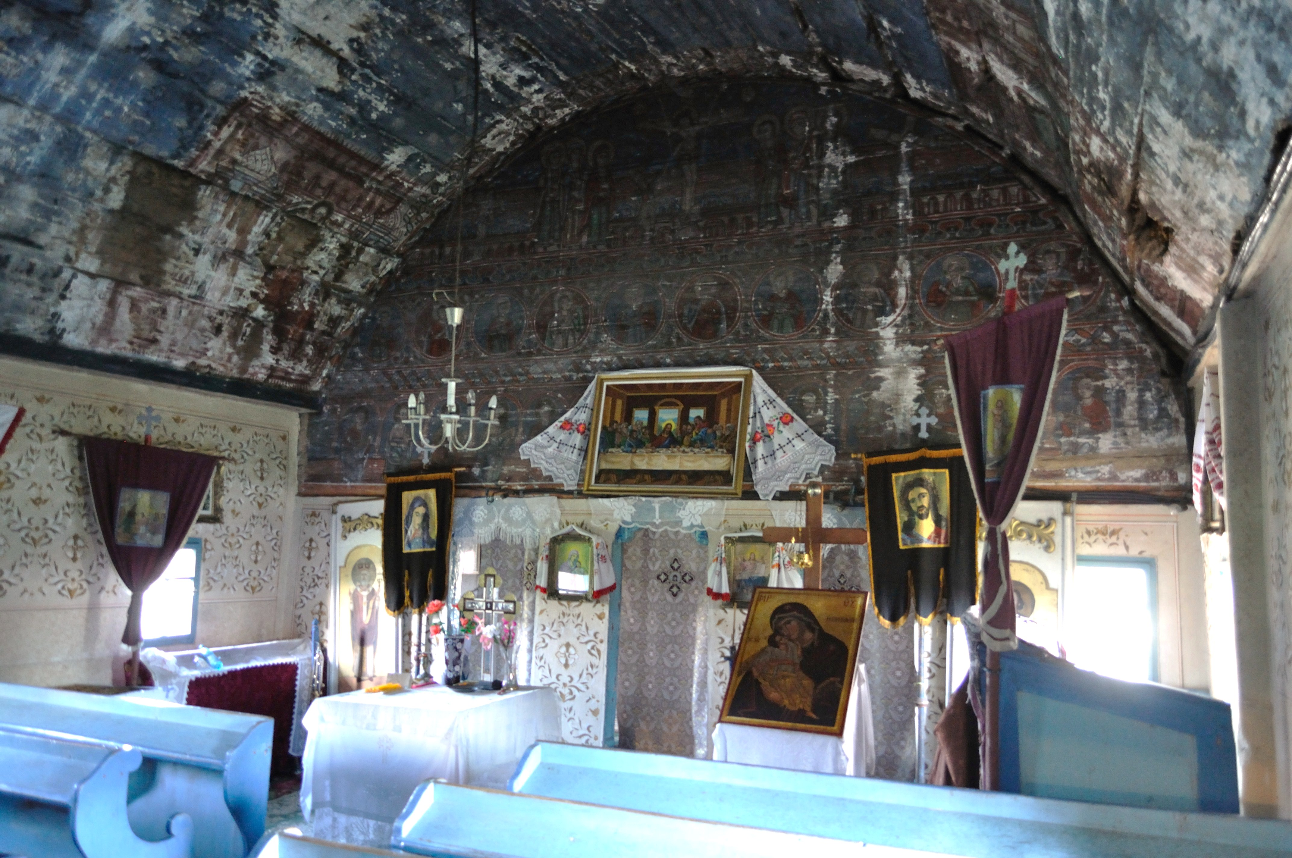 Biserica de lemn „Sfântul Nicolae” din Bădeni, județul Cluj